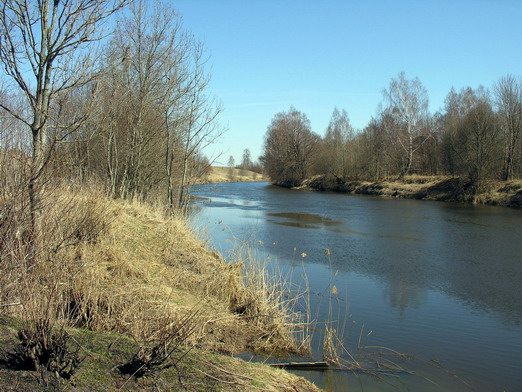 Venta ties Miliais, Mažeikių raj. Fotografavo: Algirdas, 2006 m. balandžio 23 d.